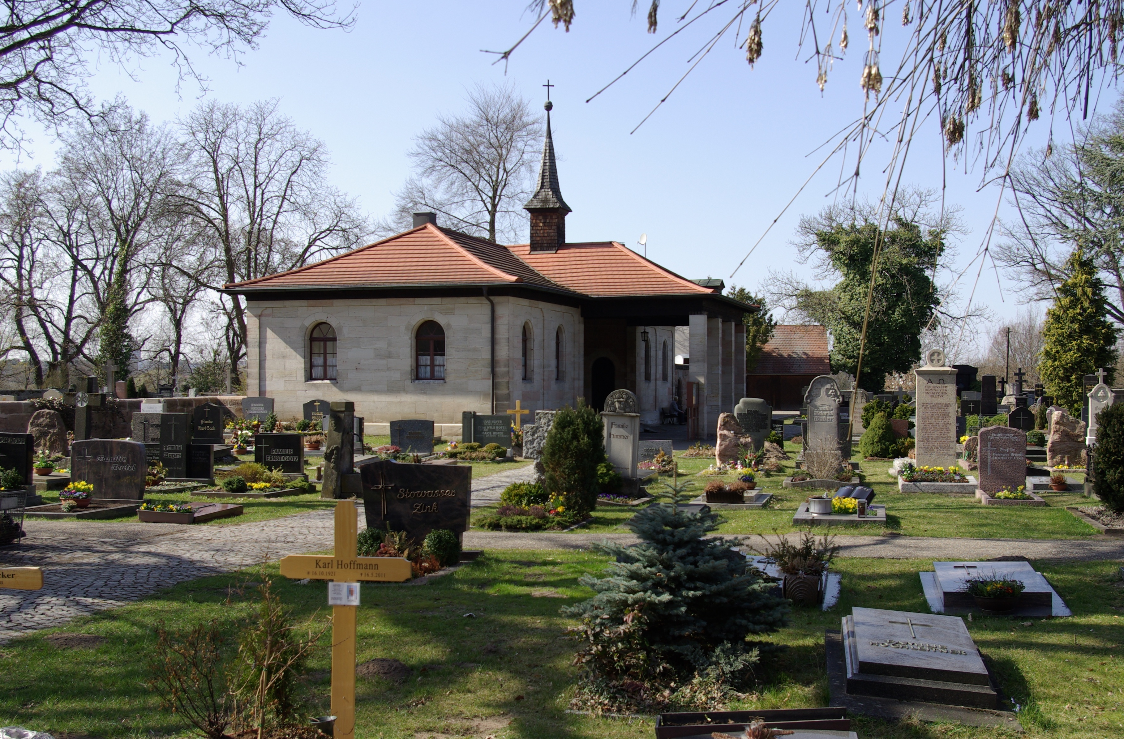 Leichenhaus auf dem Neustädter Friedhof in Erlangen